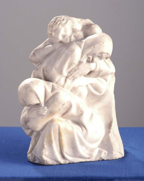 Jean de Cambrai vers 1400 (?) Marbre Bourges musée du Berry, inv. 1891.24.1